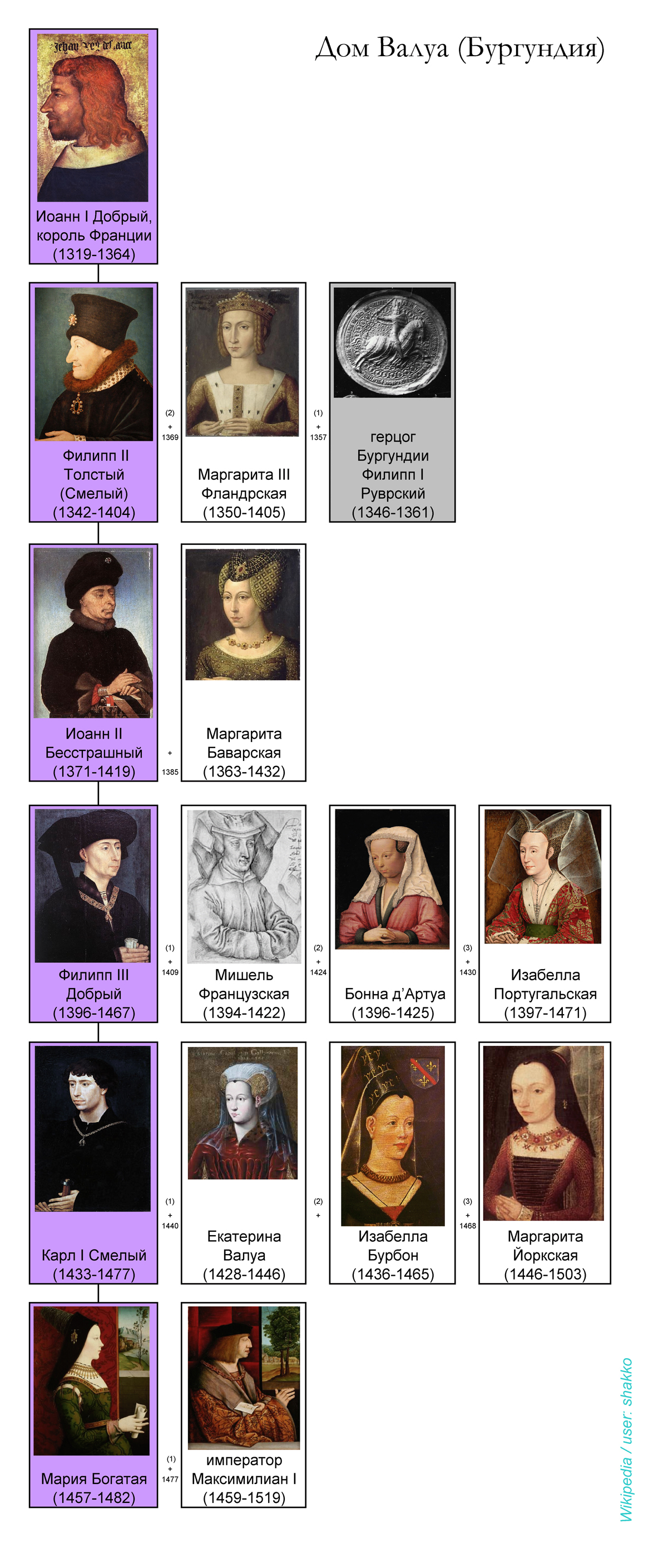 Родословие бургундских герцогов